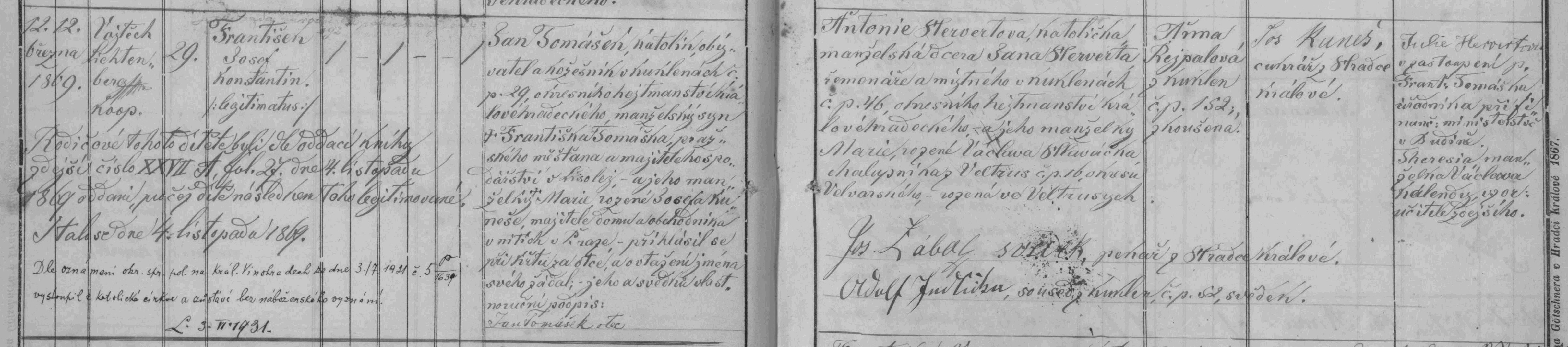 Matriční zázmam narození politika Fr.Tomáška - matrika N1868-1885 Kukleny